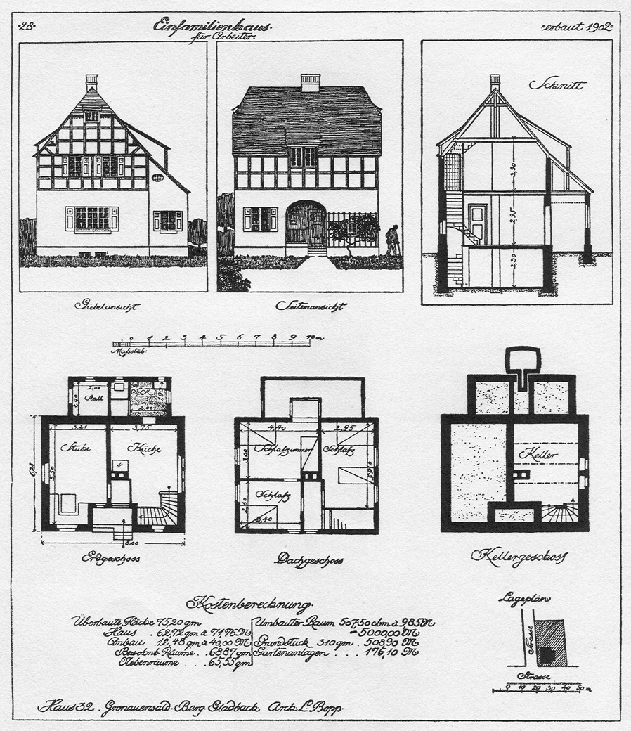 Bauzeichnung von Haus Nr. 32 in der Gronauer Waldsiedlung